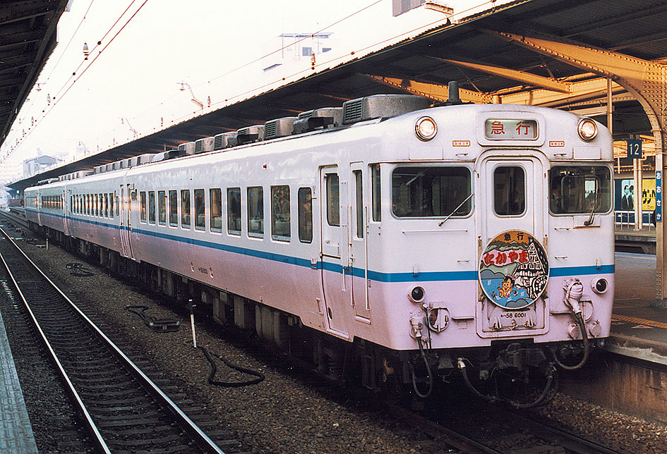 JR西日本 急行たかやま キハ58 6001